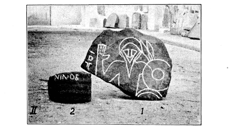 azazga